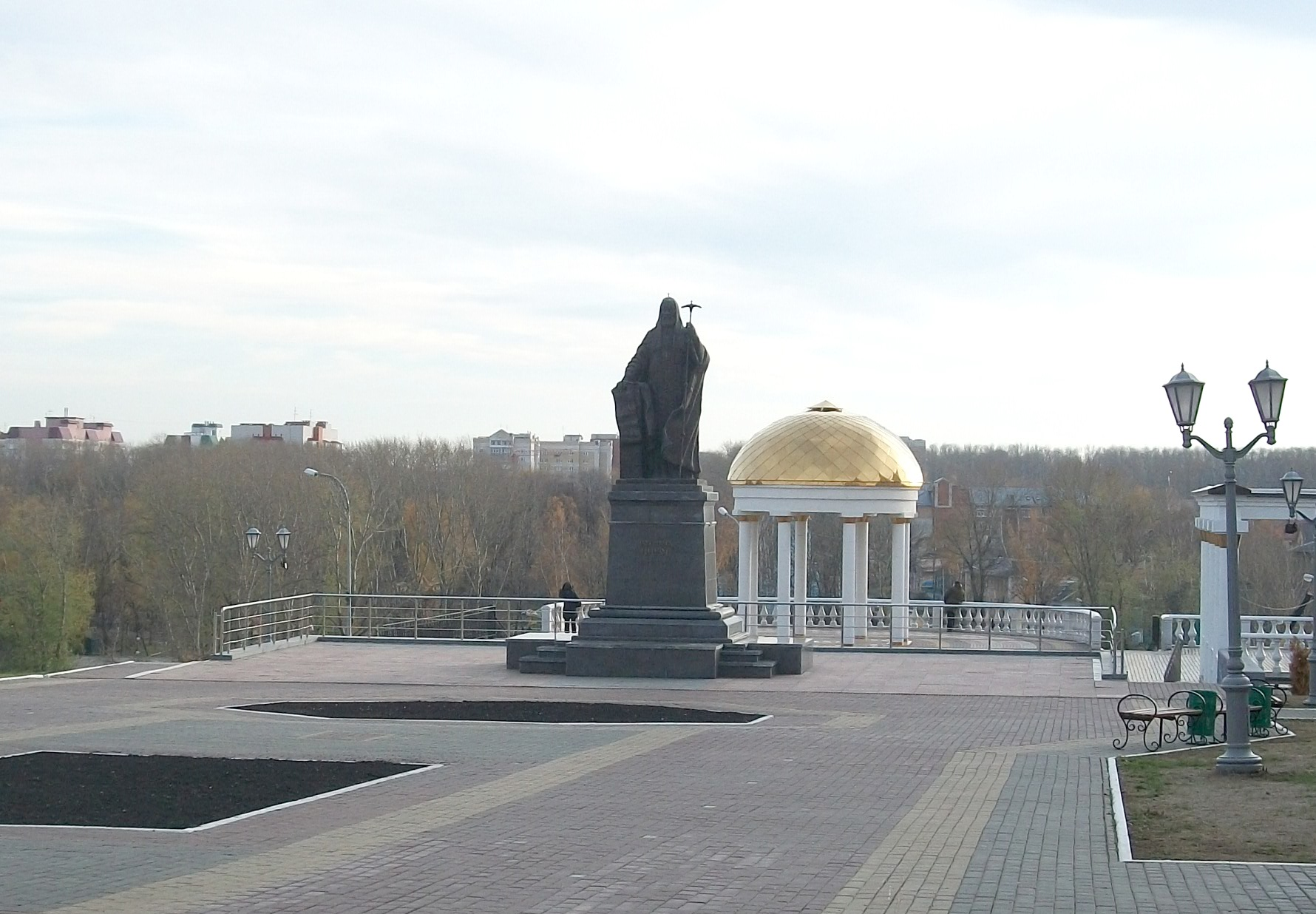 Памятник Патриарху Никону в Саранске (Республика Мордовия). Открыт в 2006 году. Скульптор Н. М. Филатов, архитектор С. П. Ходнев.